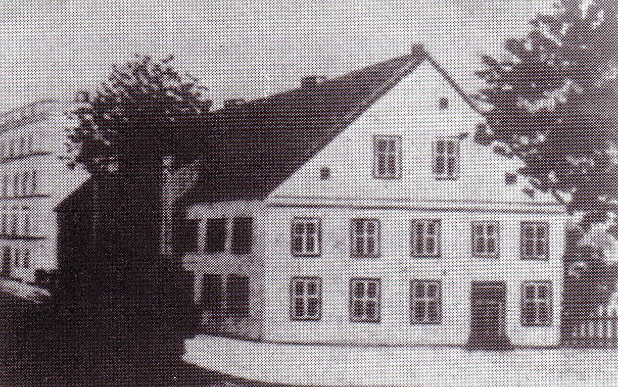 Lithographie des Königlichen Gymnasiums in Lyck